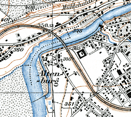 Kraftwerk Brugg auf dem Blatt "Brugg" der Siegfriedkarte. Datenstand 1940